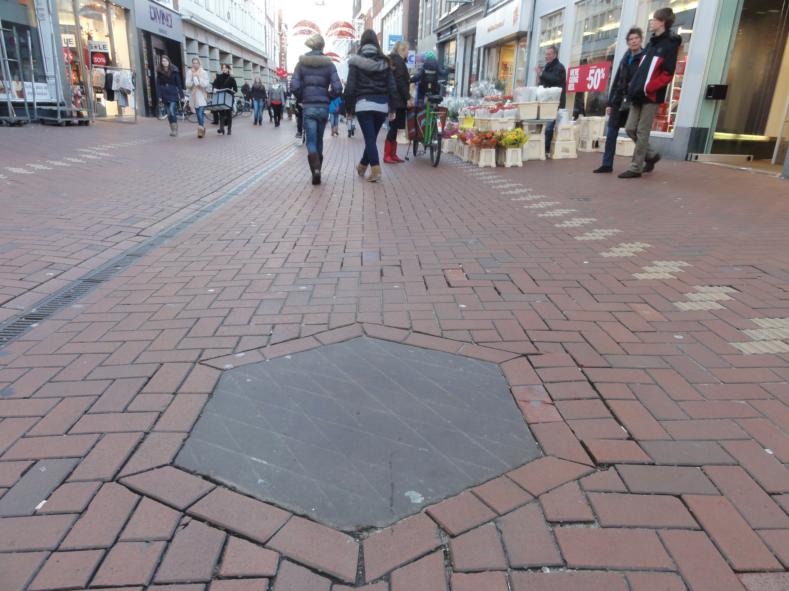 De Rode Steen in Leiden, gelegen in de Haarlemmerstraat ter hoogte van de Donkersteeg, gaf de grens aan tussen de parochies van Onze-Lieve-Vrouwe (Onze-Lieve-Vrouwekerk) en Sint Pancras (Hooglandse kerk). De schout van het ambacht Marendorp sprak hier recht.